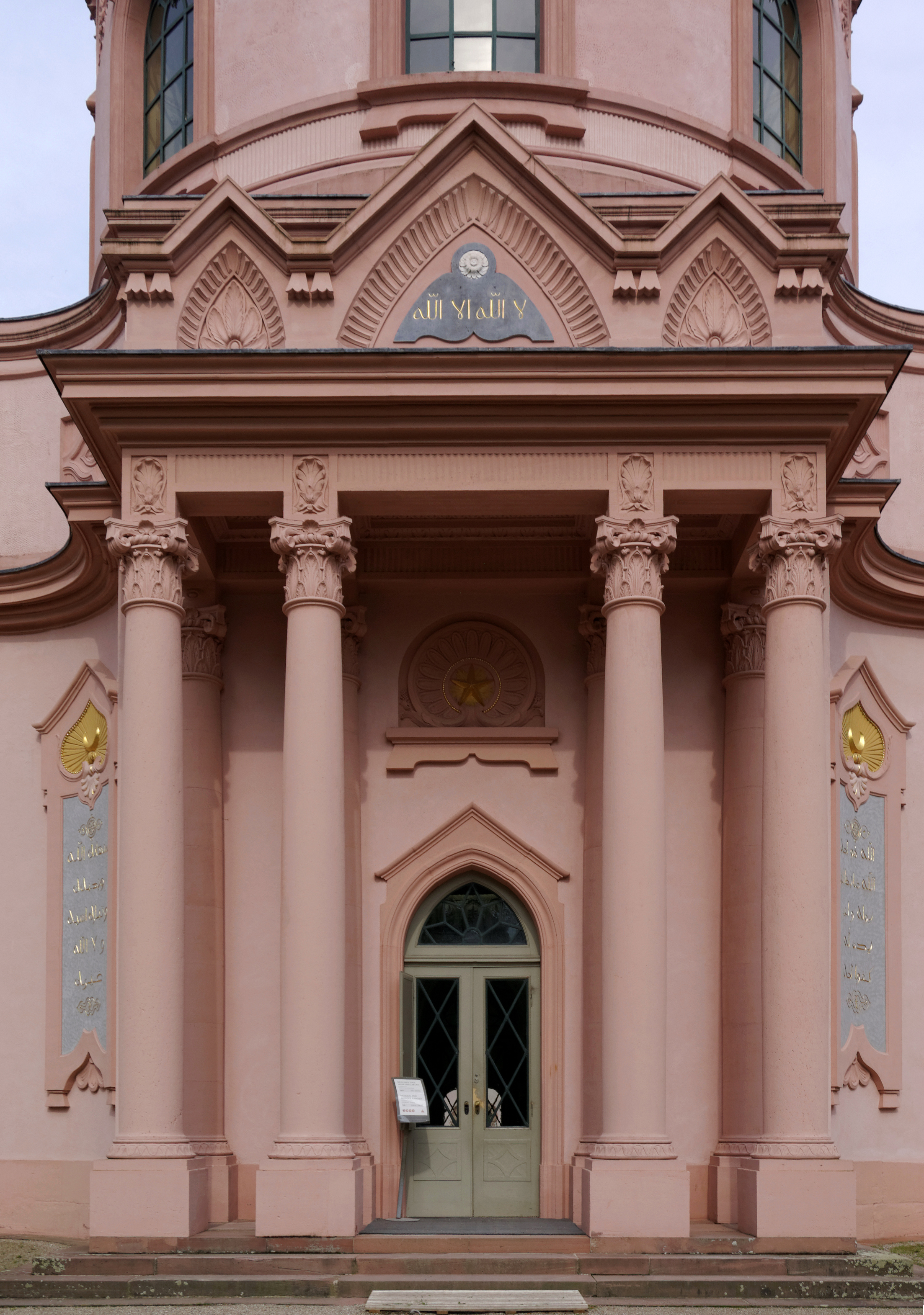 Schwetzingen, Moschee im Schloßgarten